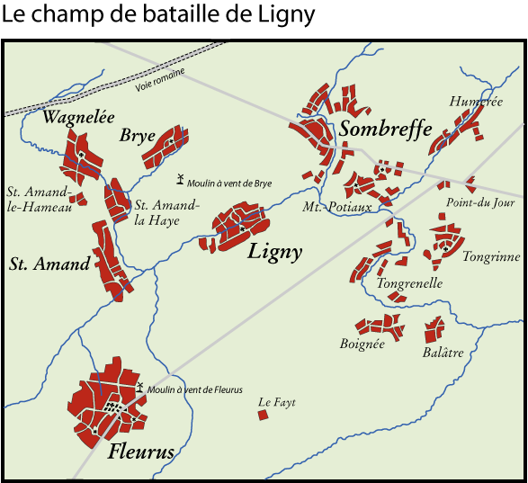 Détail de la bataille de Ligny